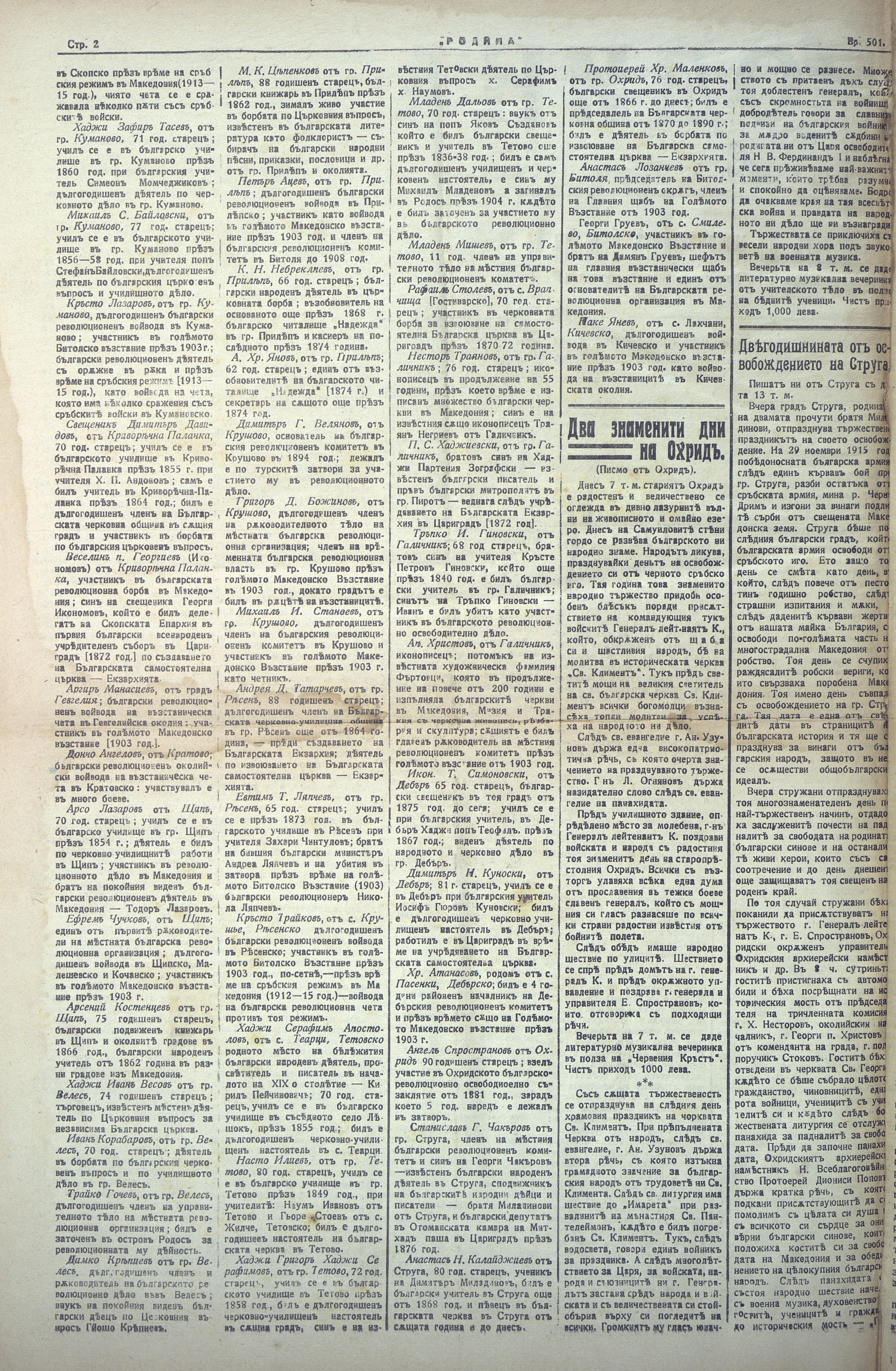 Вестник „Родина“, Скопие.